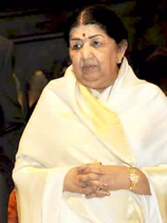 Lata Mangeshkar at Dinnanath Mageshkar Awards